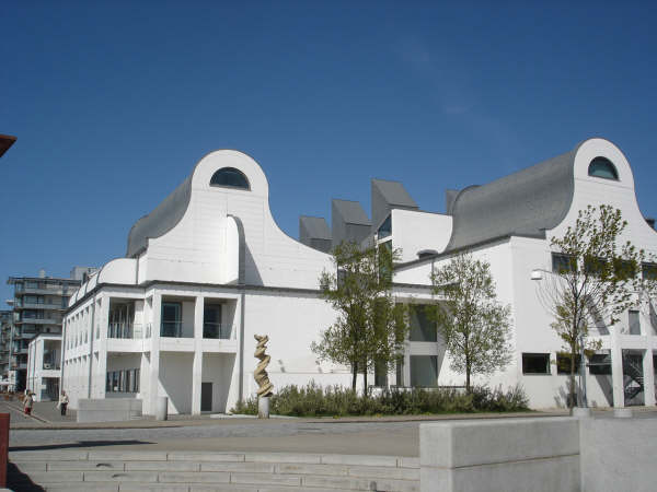 Henry Dunker Culture Centre, Helsingborg